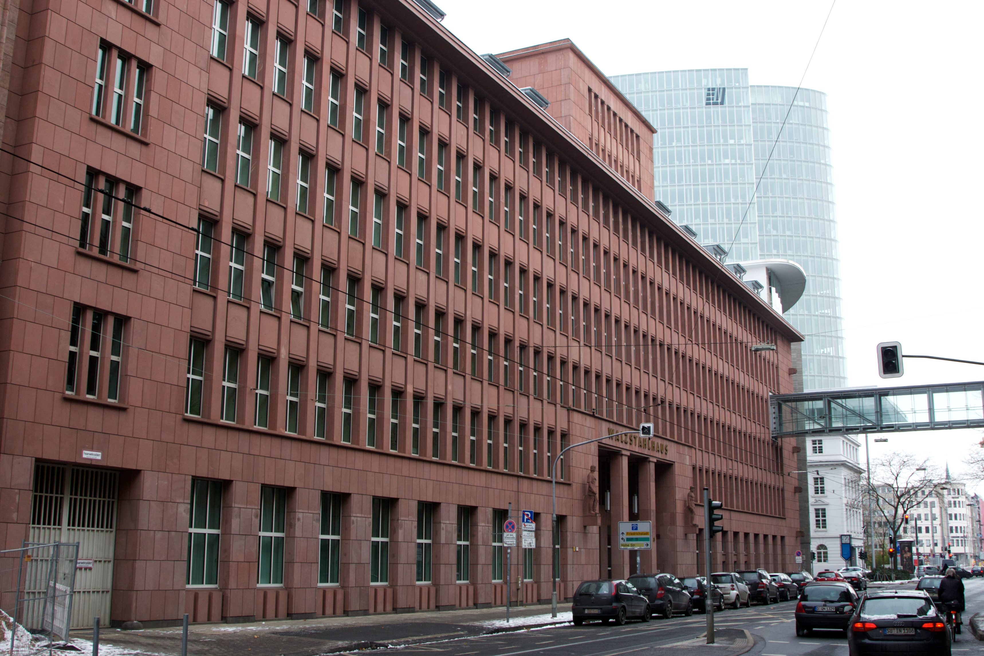 Walzstahlhaus Düsseldorf, Kasernenstraße 36, Düsseldorf